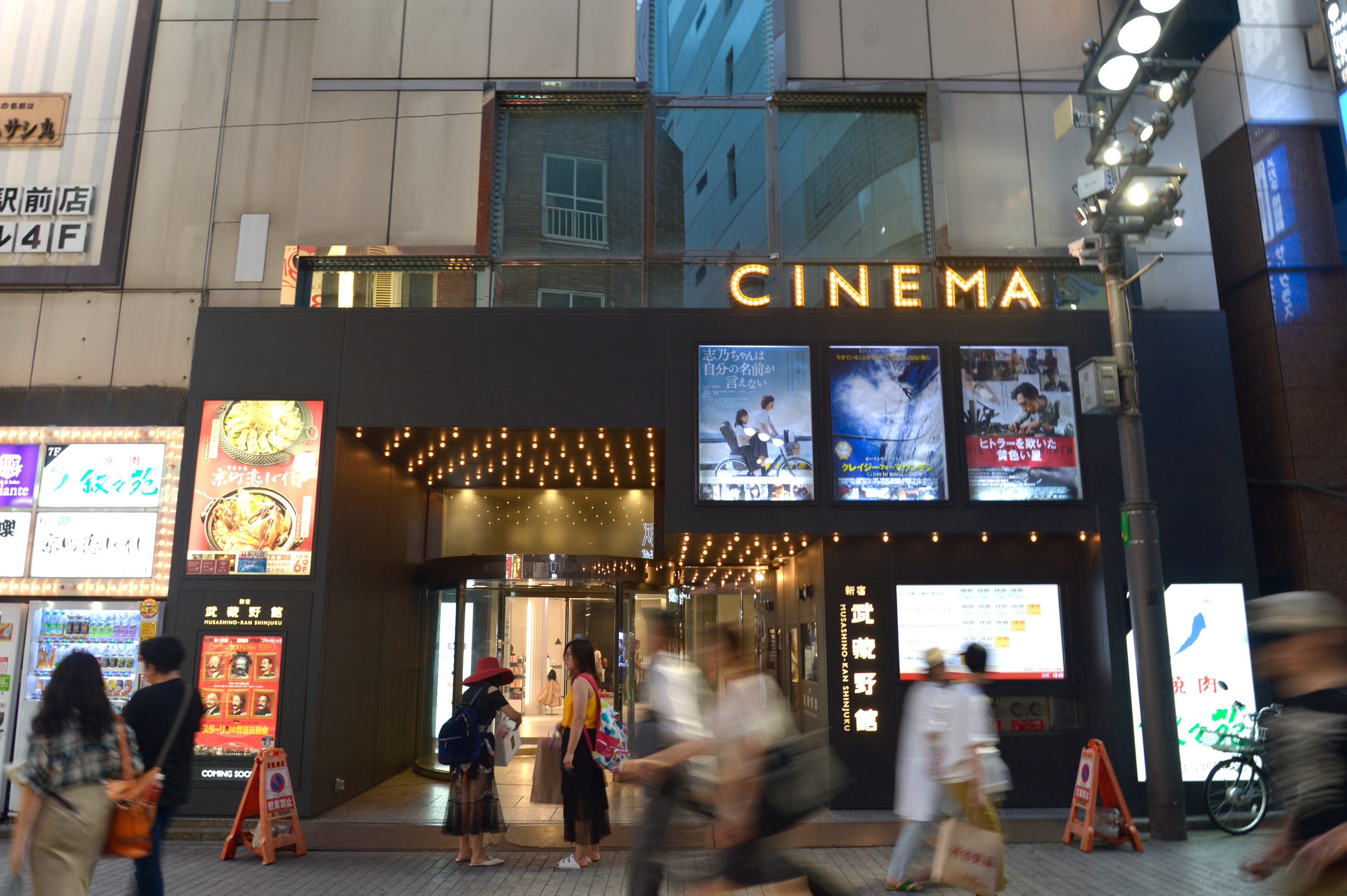 新宿武蔵野館のリニューアルオープン後の外観。2018年8月に撮影。